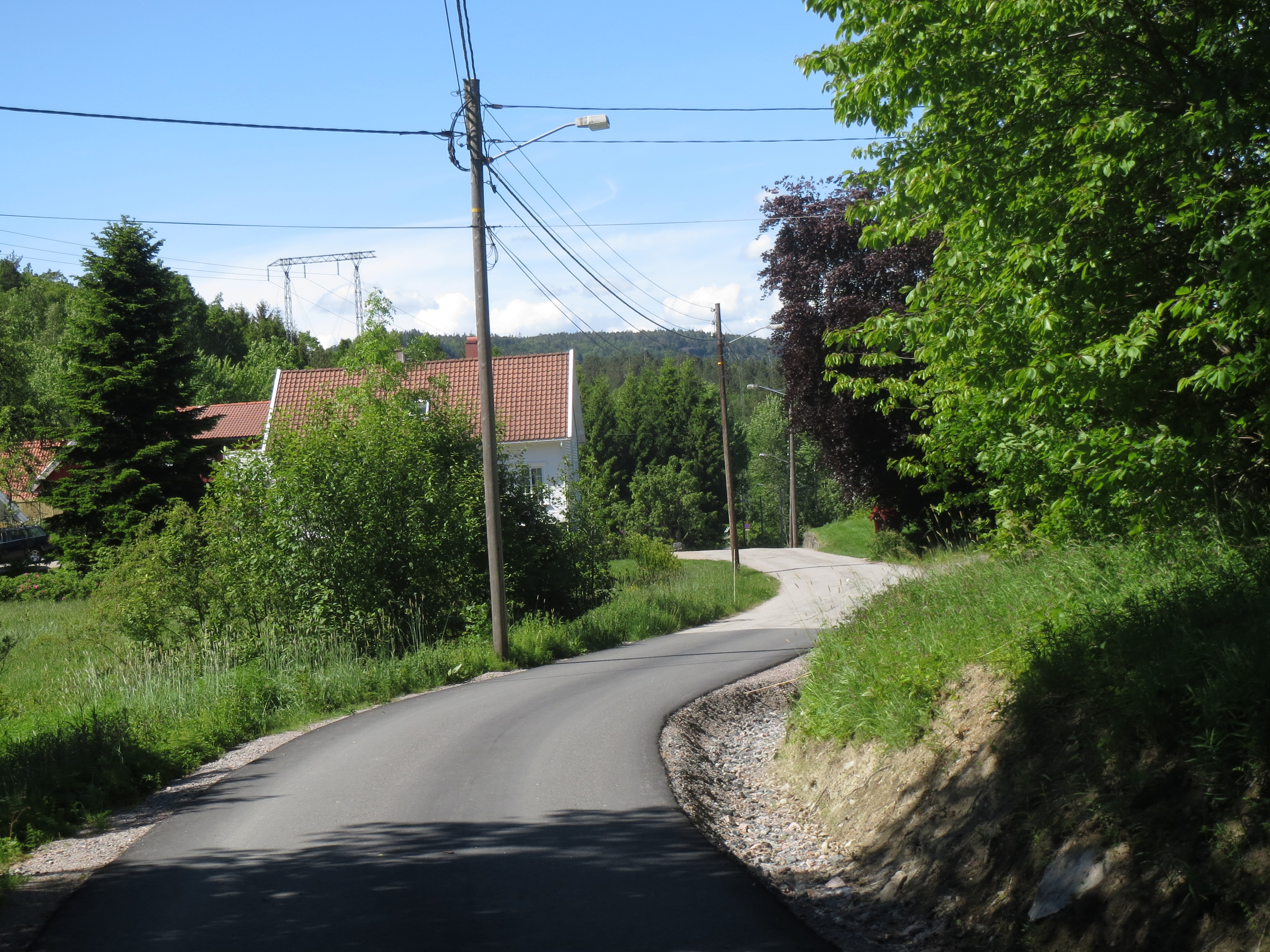 Nedre Gill, Kristiansand